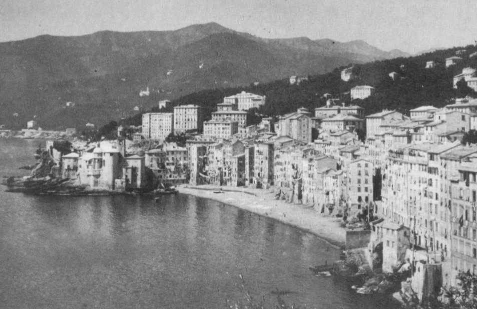 Panorama di inizio Novecento di Camogli, Liguria, Italia